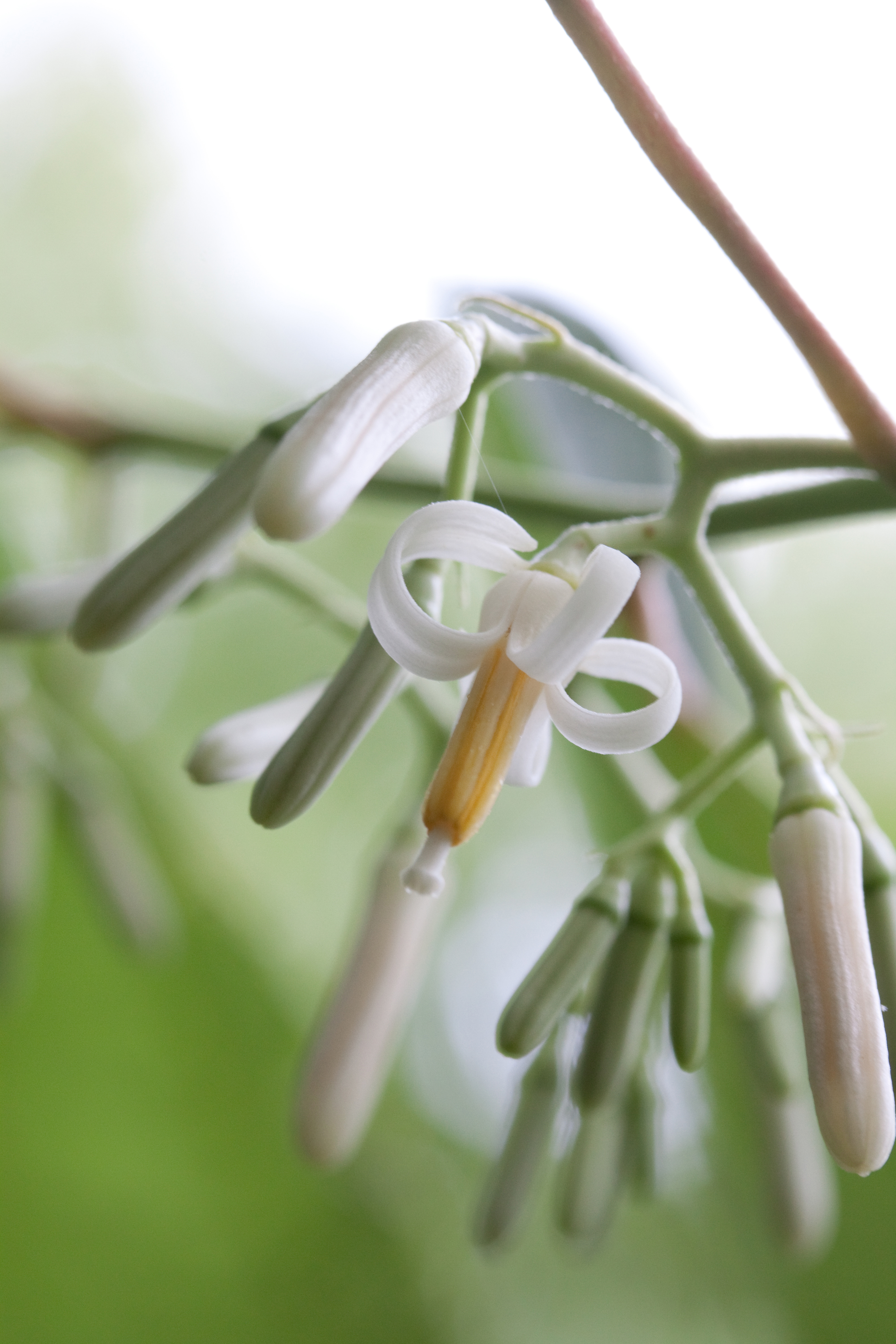 Alangium chinense - Fleurs - Jardin botanique de Strasbourg